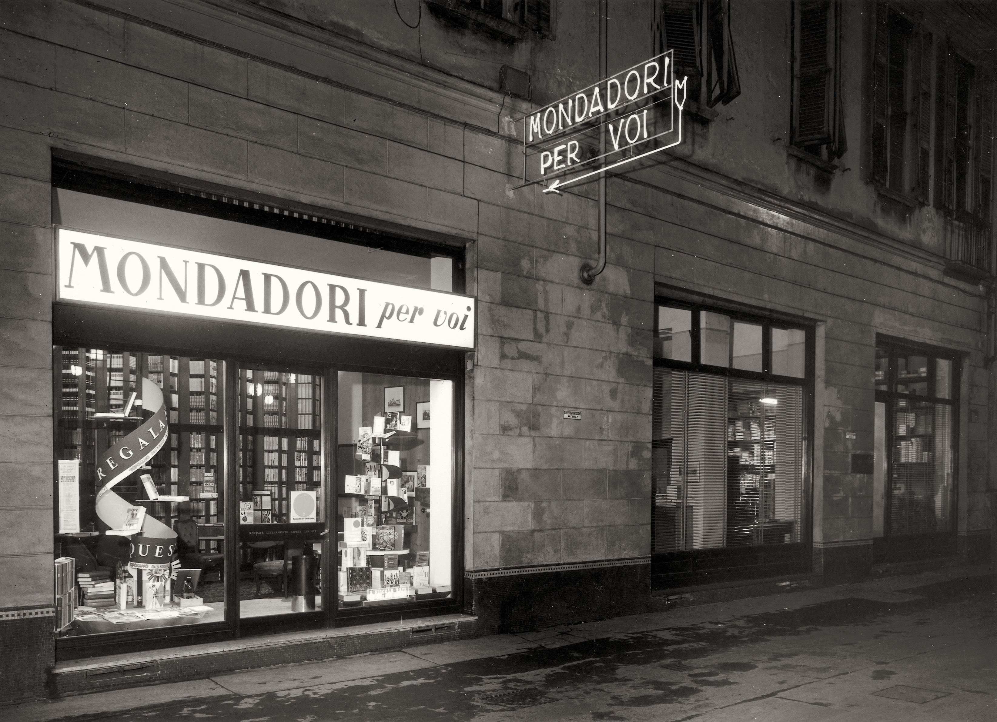 Nel 1954 nasce la catena di librerie Mondadori per Voi, a Milano.